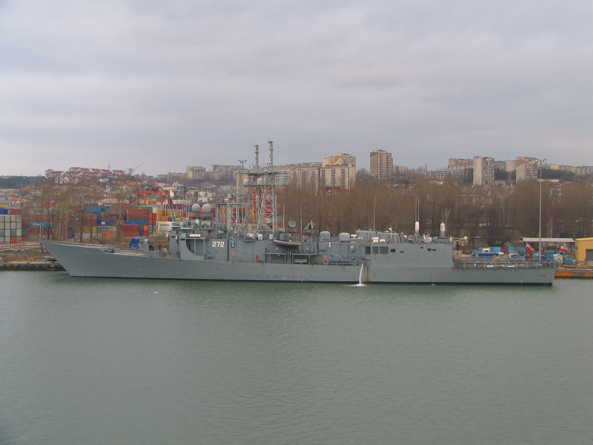 ORP 272 Gen. K. Pułaski w porcie Gdynia